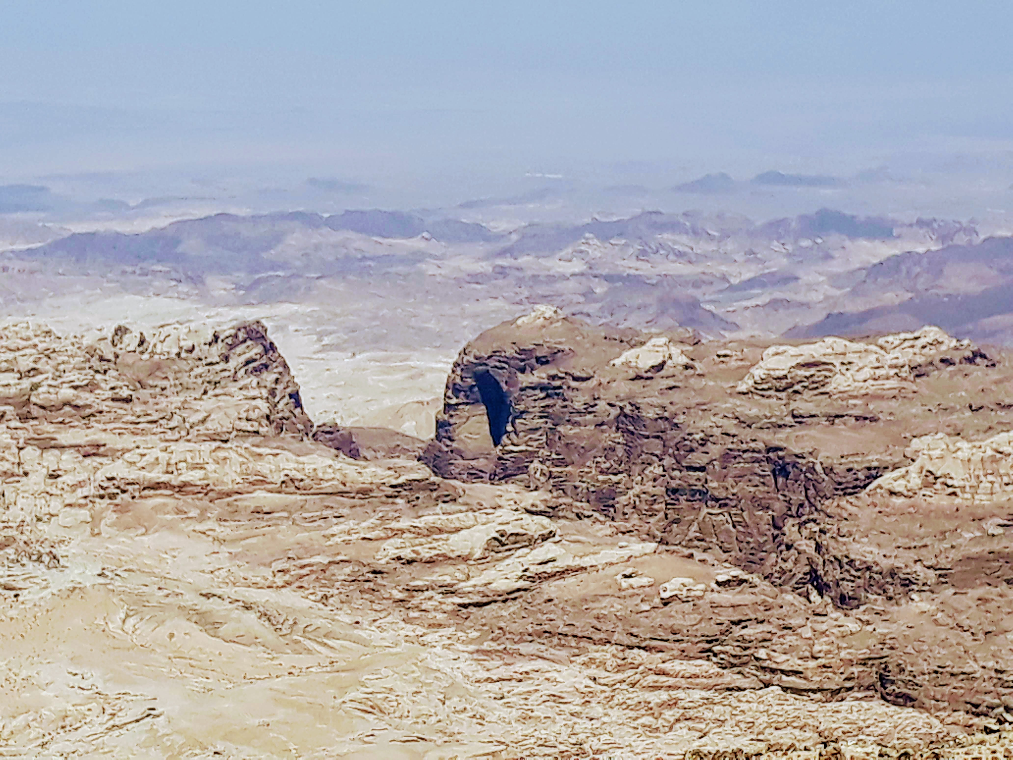 വാഡിമൂസ യിലെ അറബ സ്ഥിതിചെയ്യുന്ന മലനിര ..ഇതിന്റെ മറ്റൊരു ഭാഗത്തുനിന്നും പെട്ര ആരംഭിക്കുന്നു